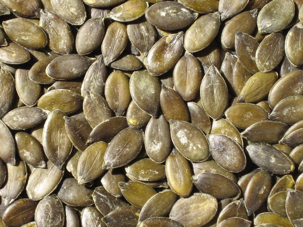 Graines de courge séchées